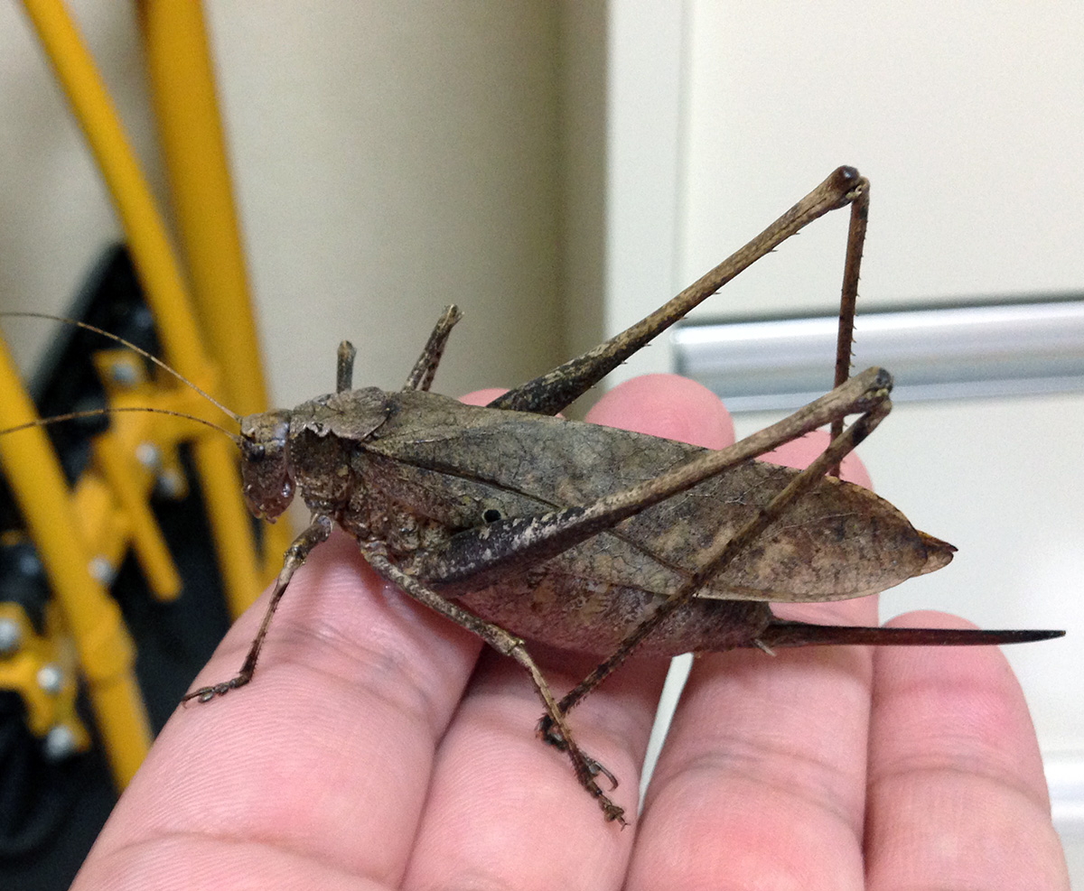 クツワムシ（雌）褐色型